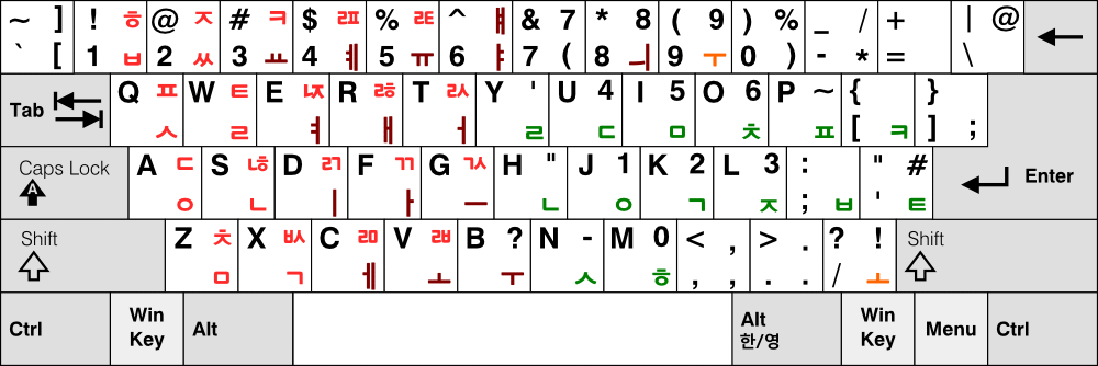 한글 세벌식 3-89 자판 (1989년에 한글문화원에서 발표)